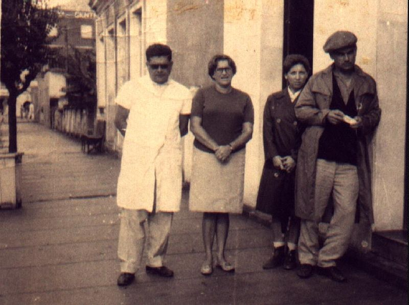 O farmacêutico Newton de Andrade Collaço, sua mulher Irma Gerlach Collaço, a médica Neide Valente Schüller e seu marido o médico Ilson Carlos Schüller, em frente à Farmácia São Salvador, Braço do Norte/SC, década de 1950. Ao fundo o Hotel Central, de João Estanislau Ângelo.